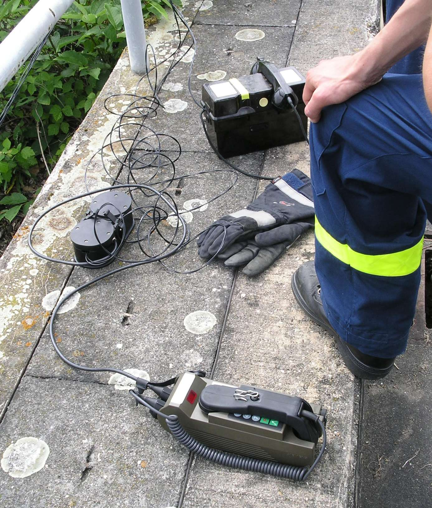 Feldtelefon